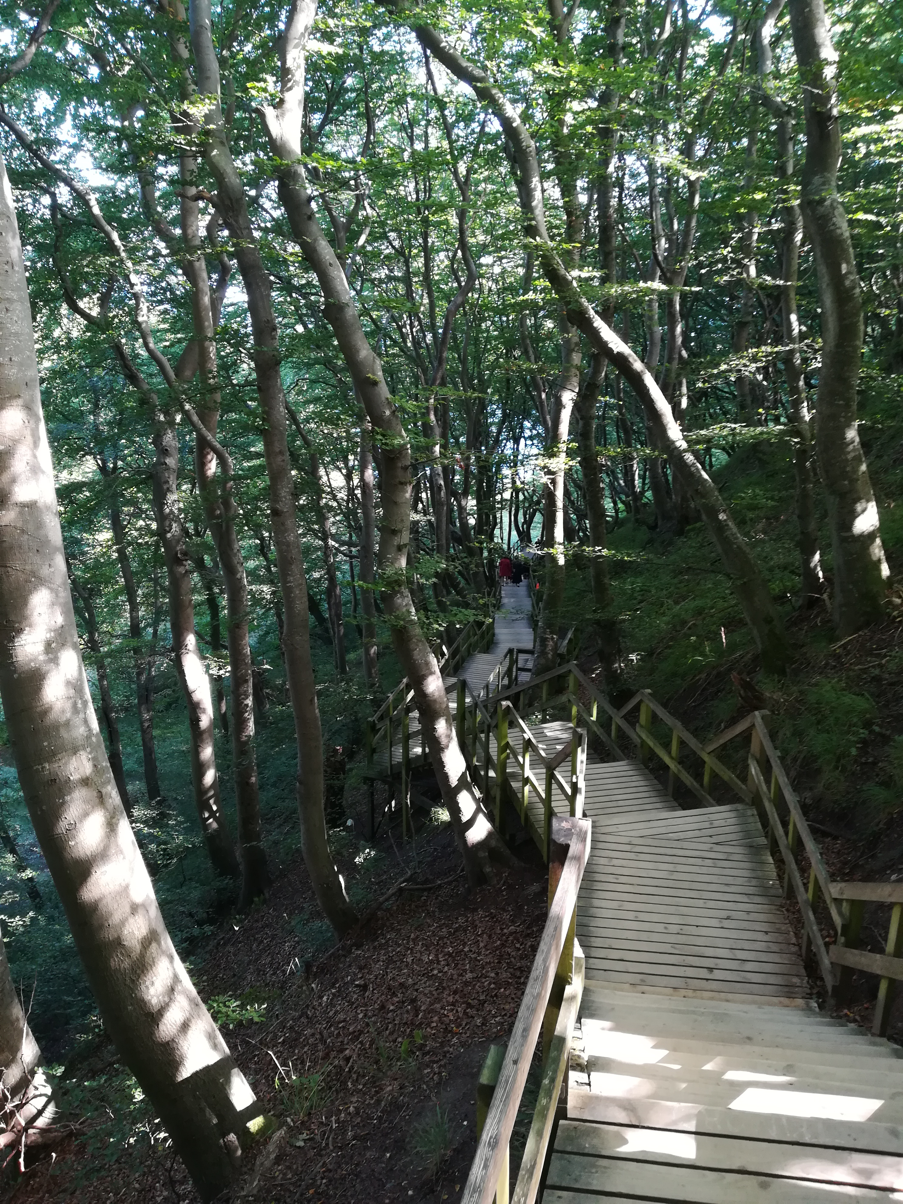 Hunderte von Treppen führen Besucher zum Strand und den weißen Klippen